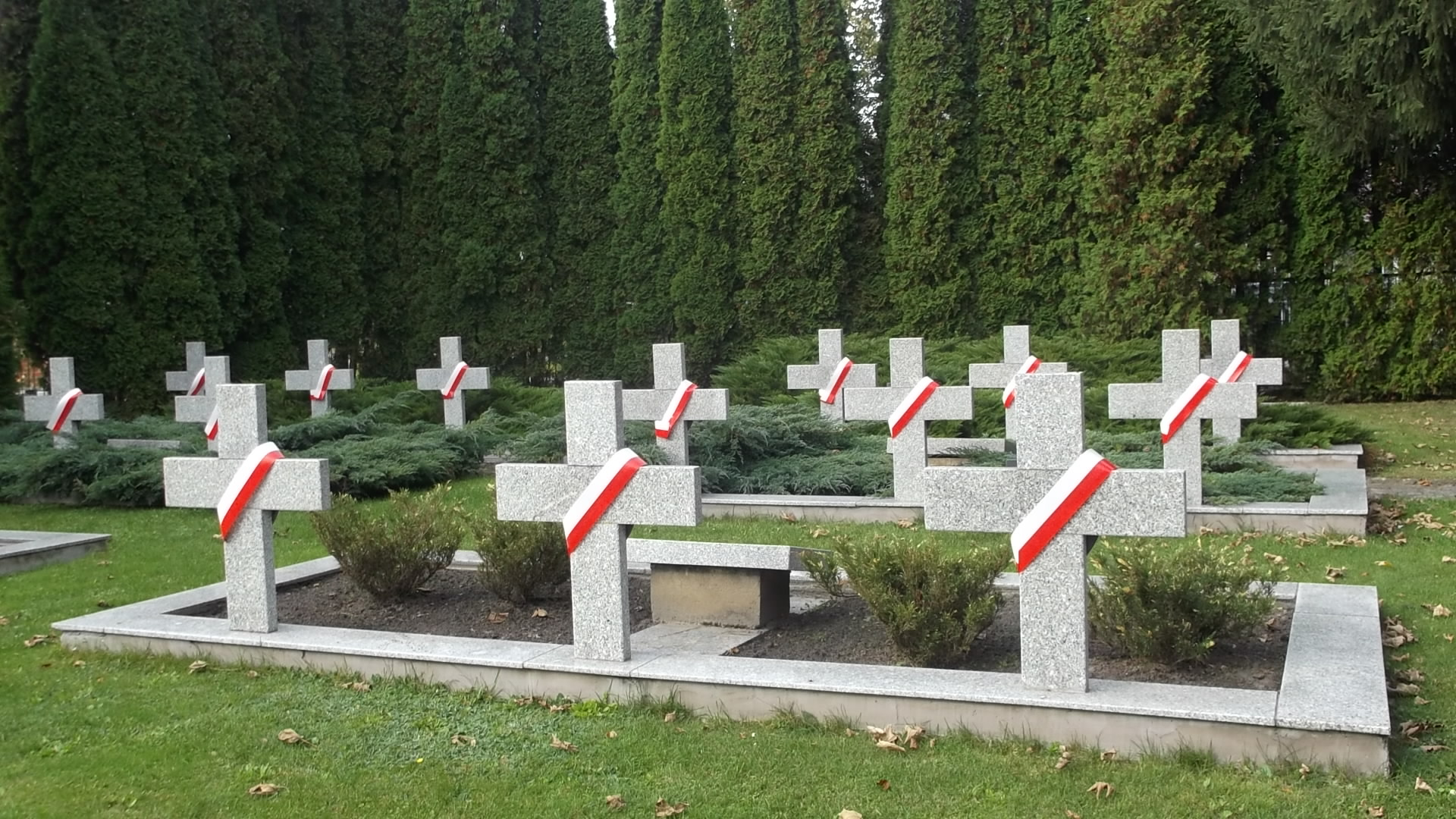 Włodawa, Cmentarz Żołnierzy Wojska Polskiego